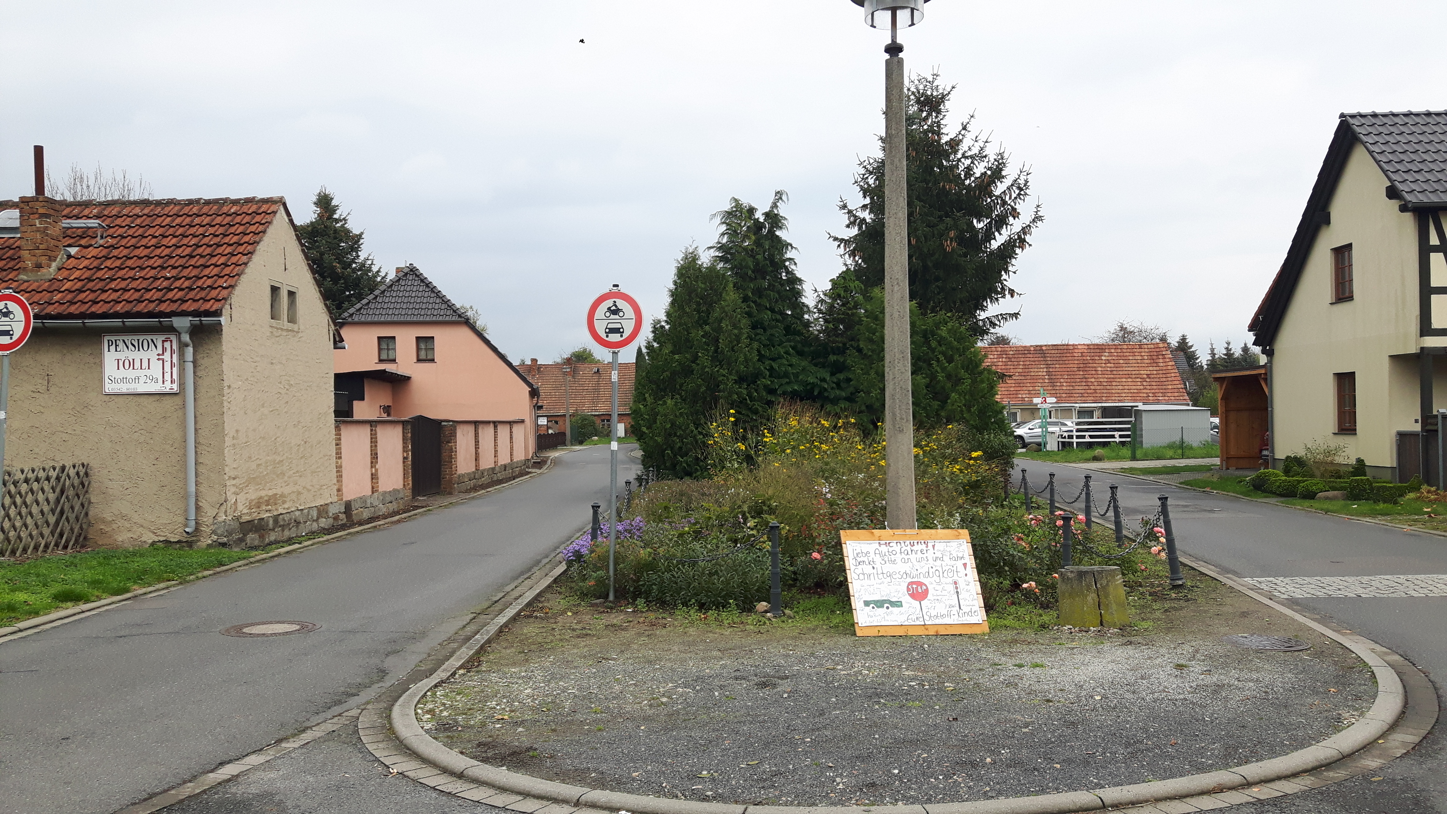 Der Stottoffer Dorfanger.